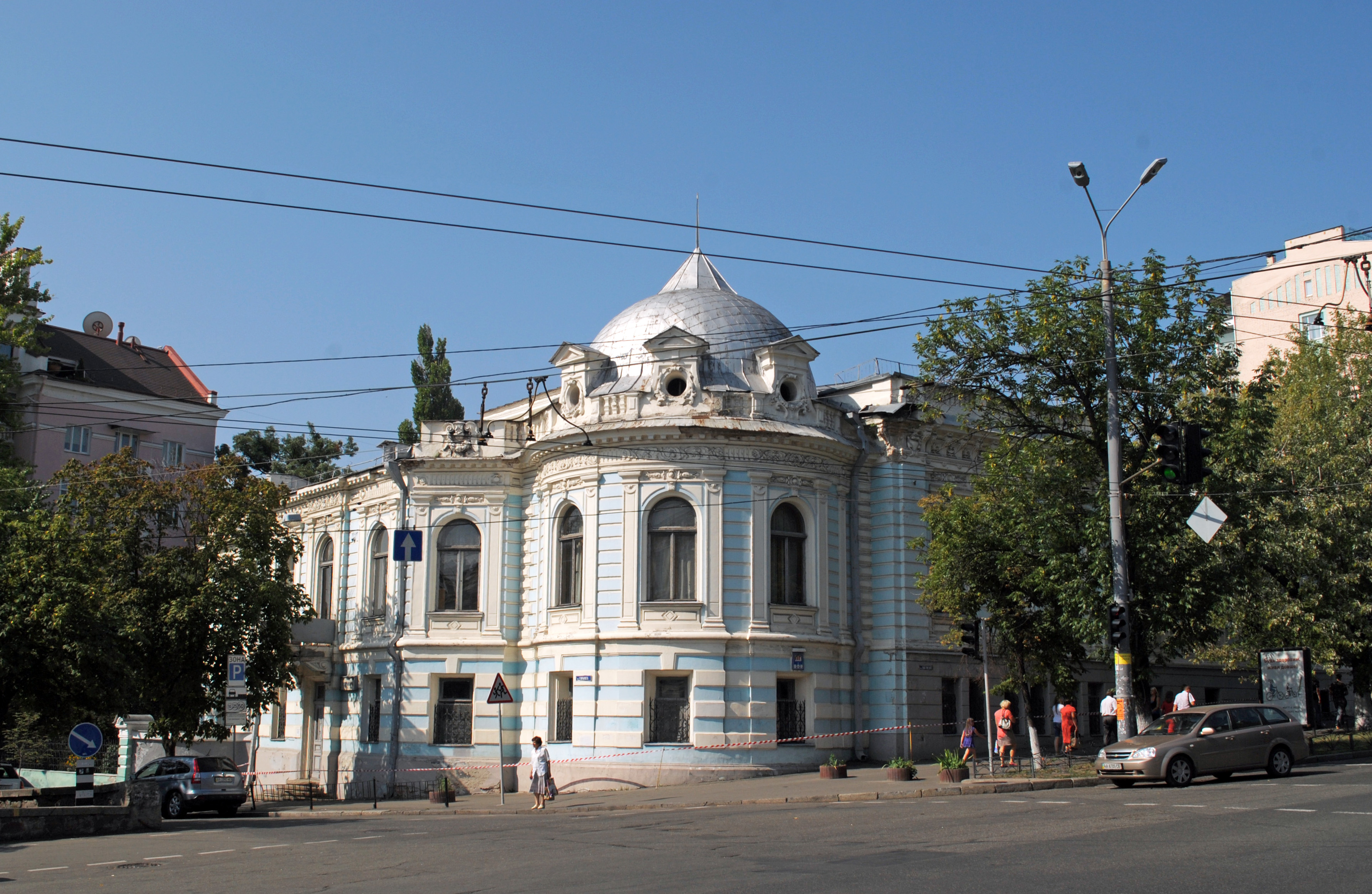 Особняк Терещенка О. (Республіканська медична бібліотека), Київ, Толстого Льва вул., 7/2